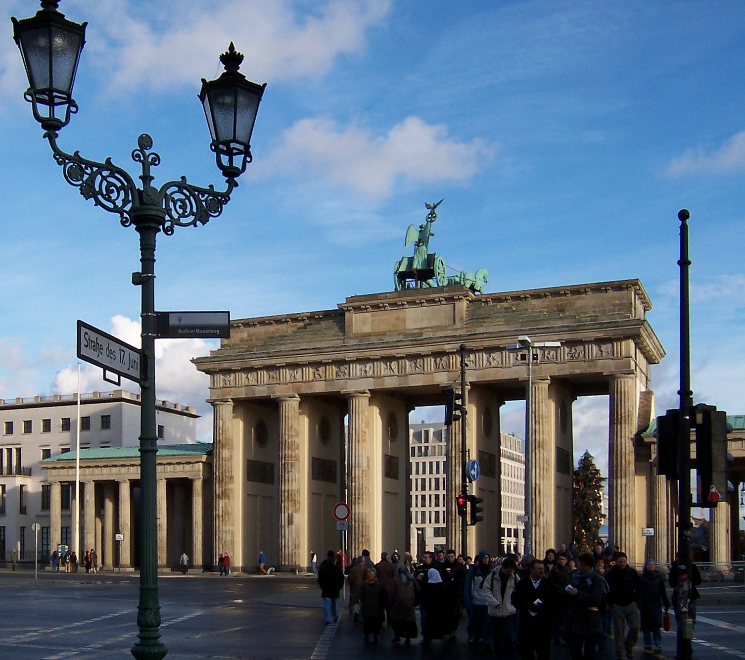 Tafel der „Straße des 17. Juni“ zwischen dem Brandenburger Tor und der Siegessäule am Ernst-Reuter-Platz in Westberlin. Die einstige Berliner Straße und Charlottenburger Chaussee wurden 5 Tage nach dem Ostberliner Volksaufstand vom 17. Juni 1953 durch den Senat so umbenannt. Ostblick auf den Brandenburger Tor.